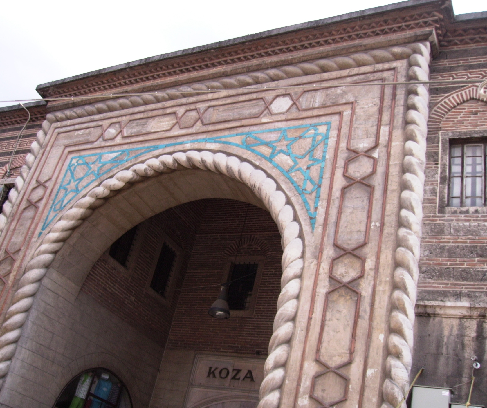 bursa-kozahan kapısı